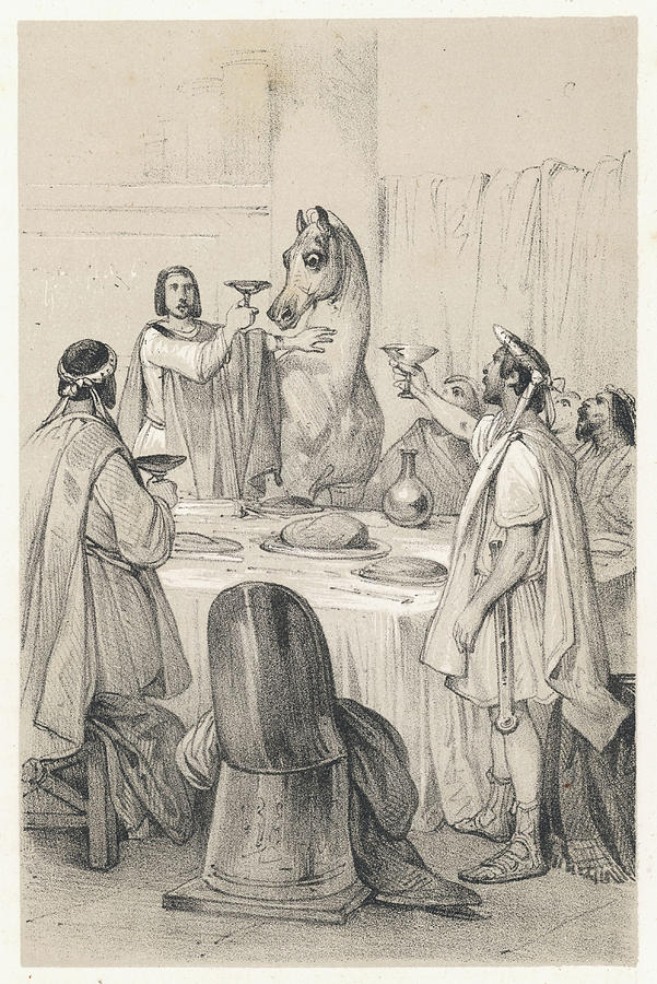 Dibujo de Calígula e Incitato por Jean Victor Adam (1801–1867)